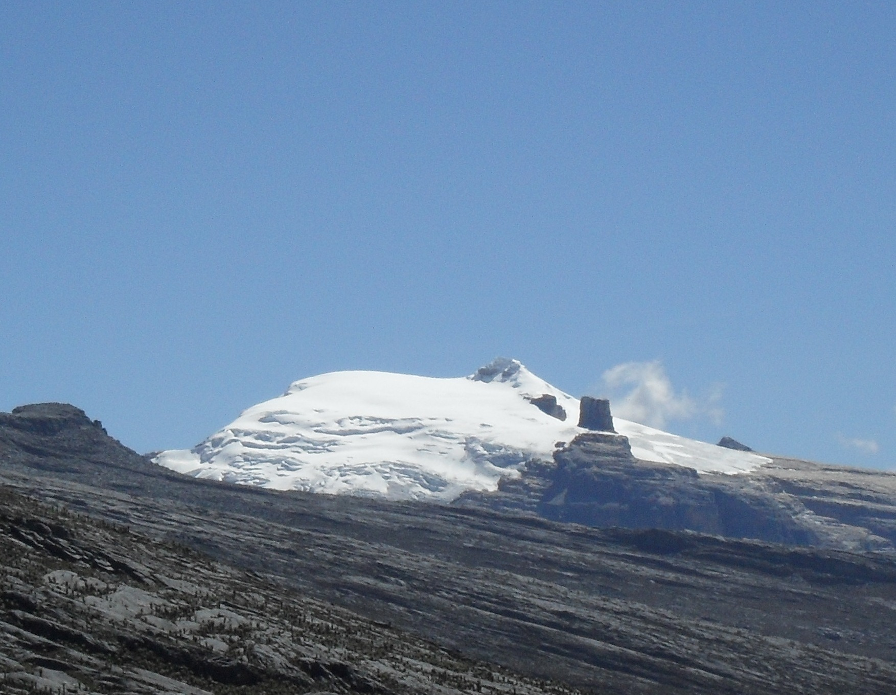 Pico Pan de Azucar en el Parque Nacional Natural Sierra Nevada del Cocuy, Guicán, en el departamento de Boyacá Colombia